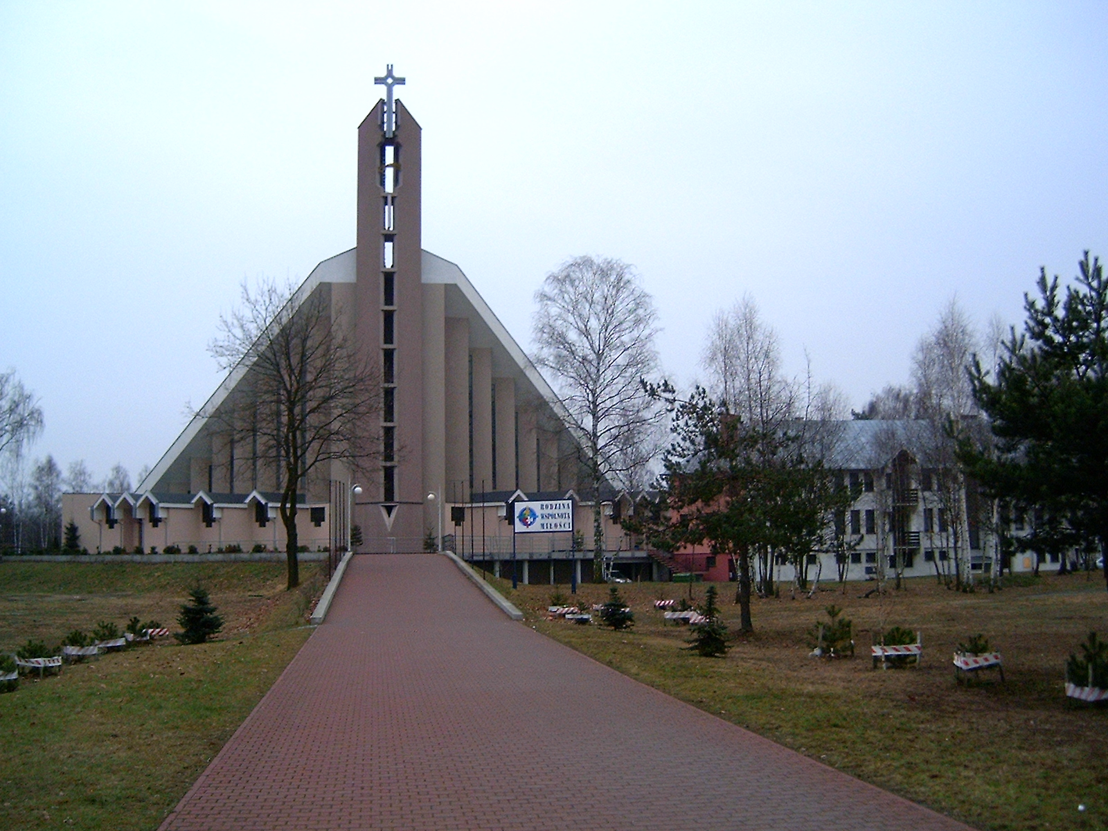 Kościół p.w. Ducha Św. i NMP Matki Kościoła, ul. B. Krzywoustego 2, osiedle Piastów - Kędzierzyn-Koźle, woj. opolskie, Polska.